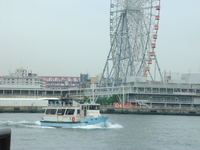 安治川上ですれ違う渡船